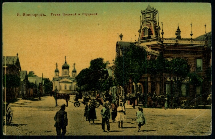 Угол Полевой и Студеной улиц в Нижнем Новгороде 1904-1917 гг.